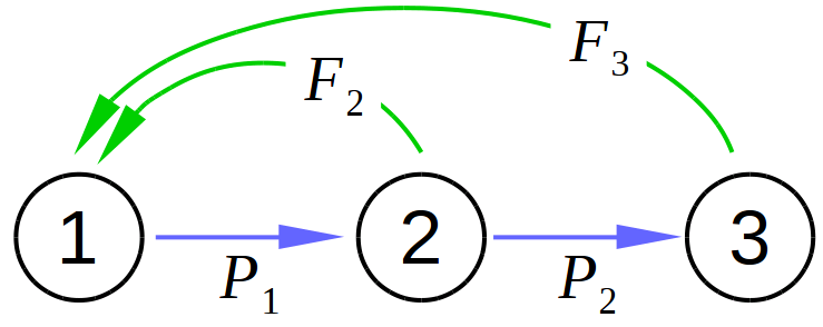 einfaches Modell eines Lebenszyklus-Graphen mit drei Zuständen